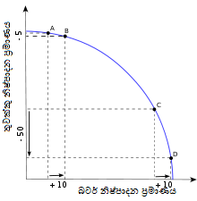 සිංහල: බටර් නිෂ්පාදනය වැඩිකරන විට A සිට B දක්වා, ආවස්ථික පිරිවැය කුඩා අගයක් නමුත් C සිට D දක්වා,ආවස්ථික පිරිවැය විශාල අගයක් වේ.